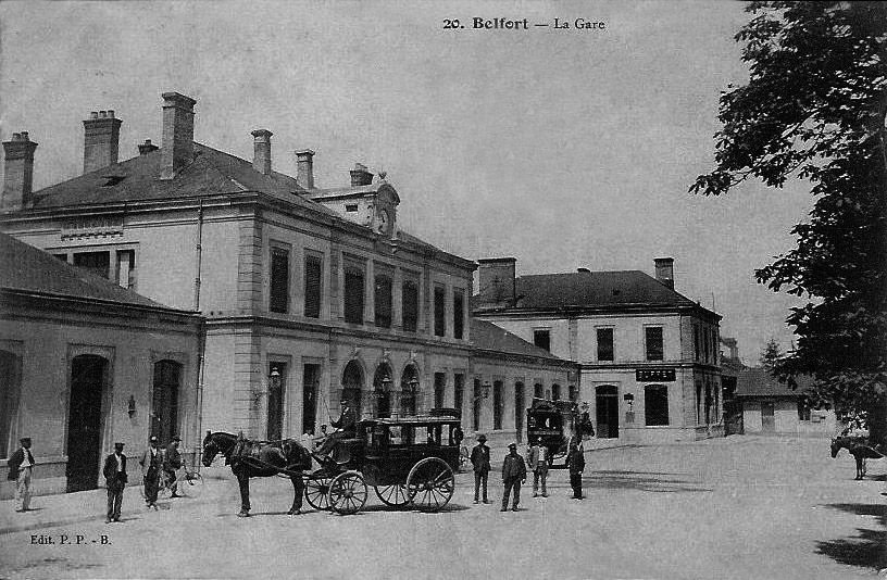 La première gare de Belfort, construite en 1864 et devenue trop petite, détruite vers 1933 pour laisser la place à une nouvelle gare plus moderne et plus vaste.